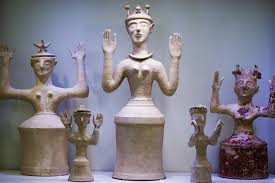 Mīnoja laikmeta dievietes, 1550.-1100. pirms Kristus, Herāklijas Arheoloģijas muzejs, Krēta.